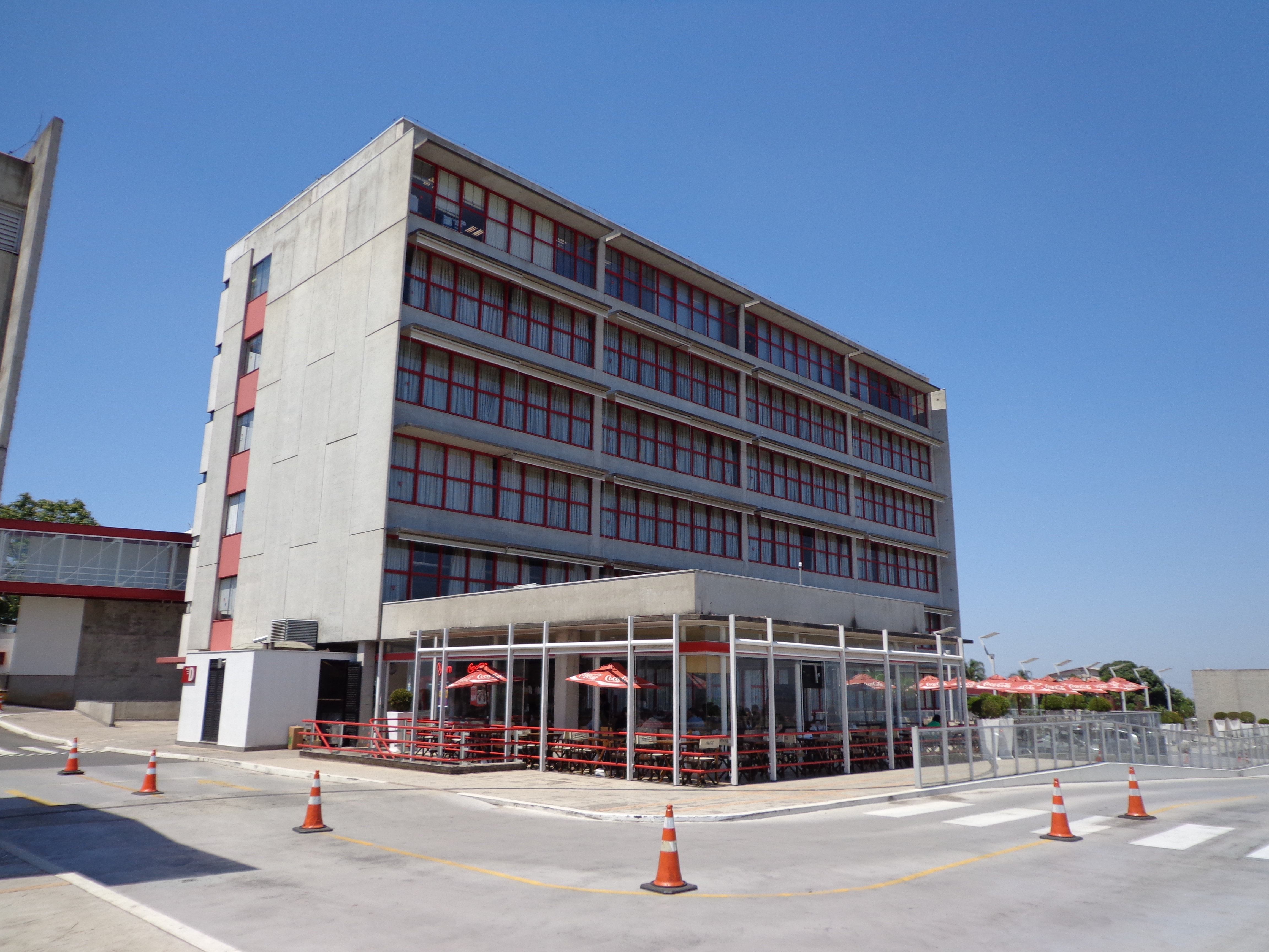 Prédio D do Centro Universitário Ritter dos Reis (UniRitter), em Porto Alegre, RS.